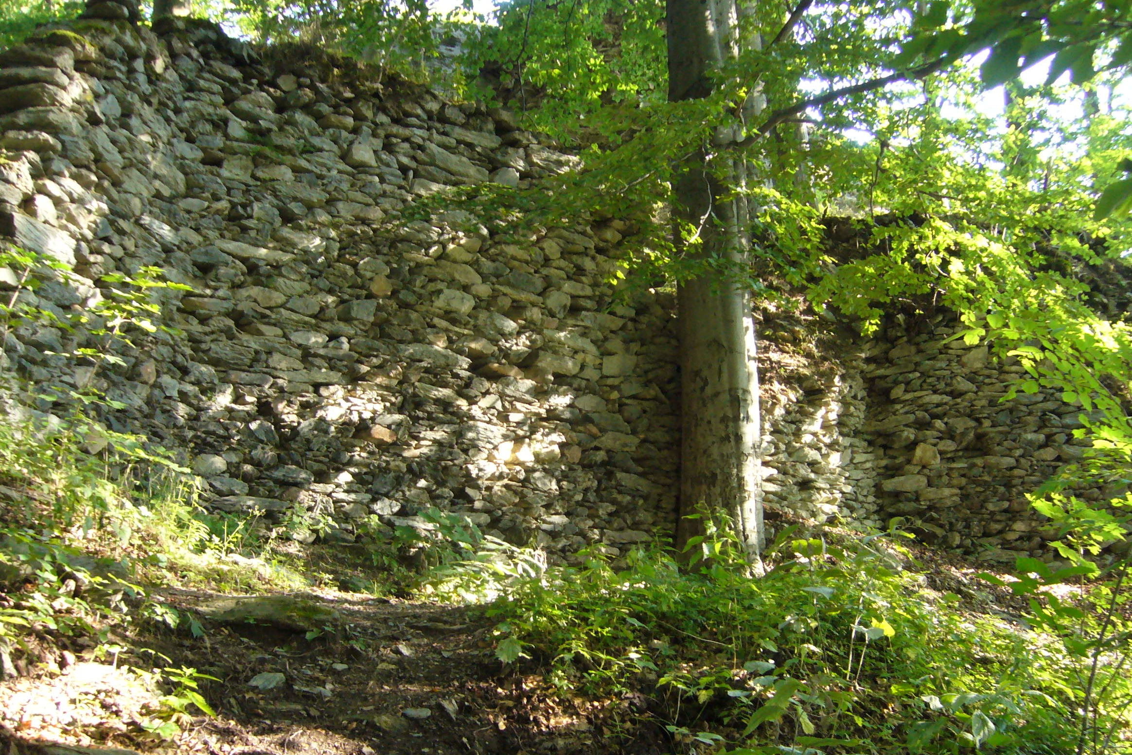 Fragmenty zdí